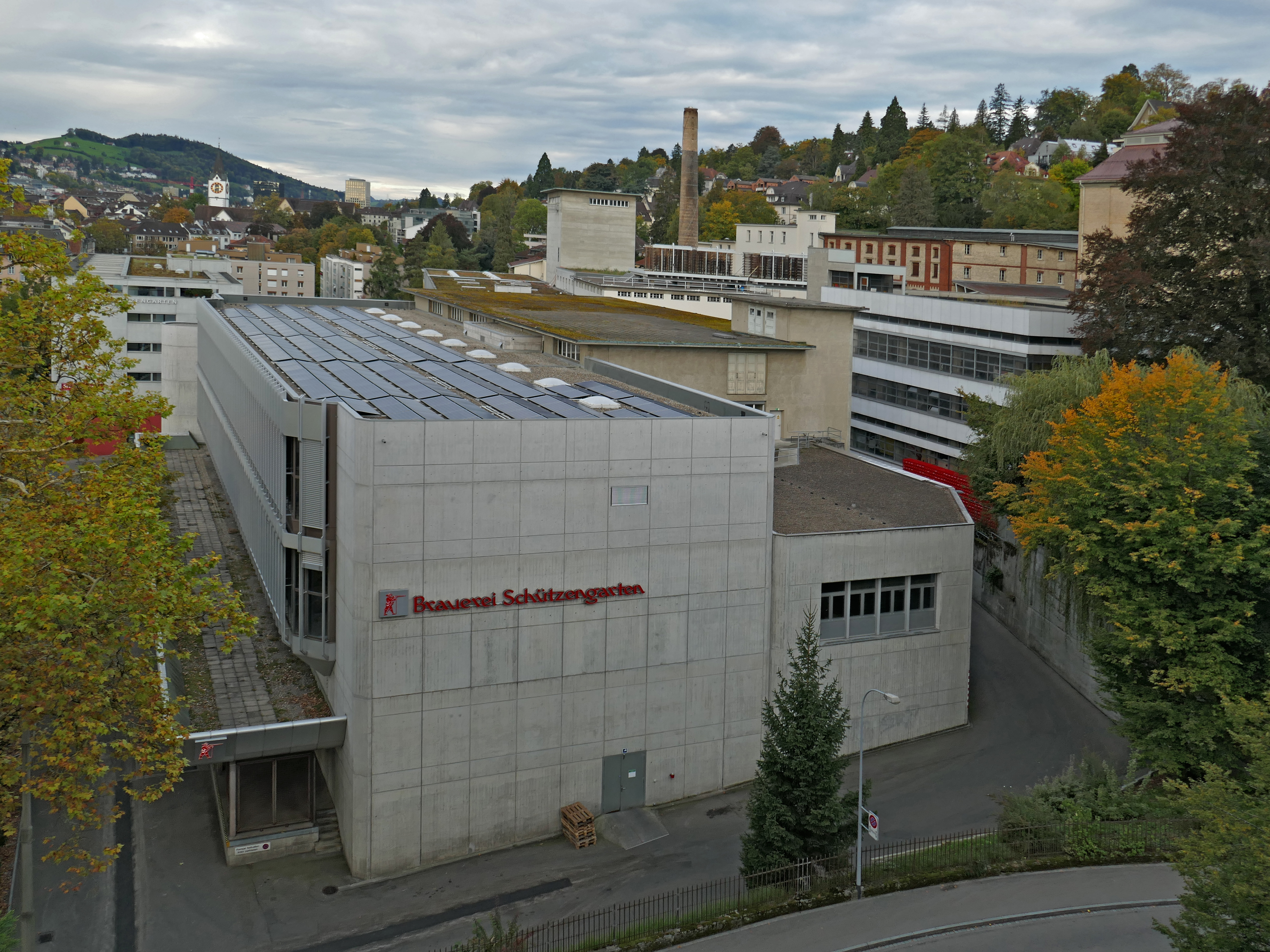 WikiCon 2018 Fotoexkursion in St. Gallen: Brauerei Schützengarten.